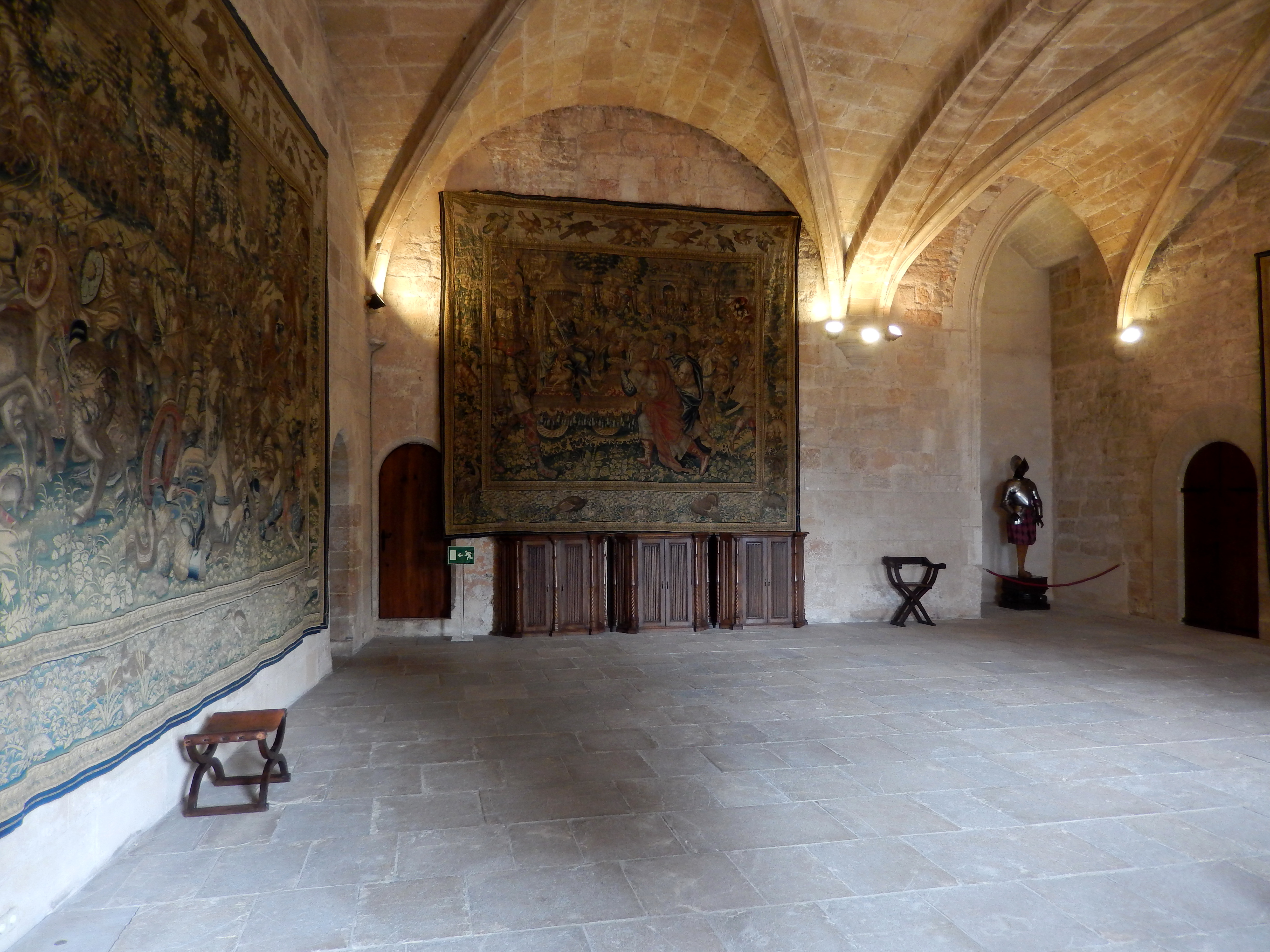 Palma de Mallorca